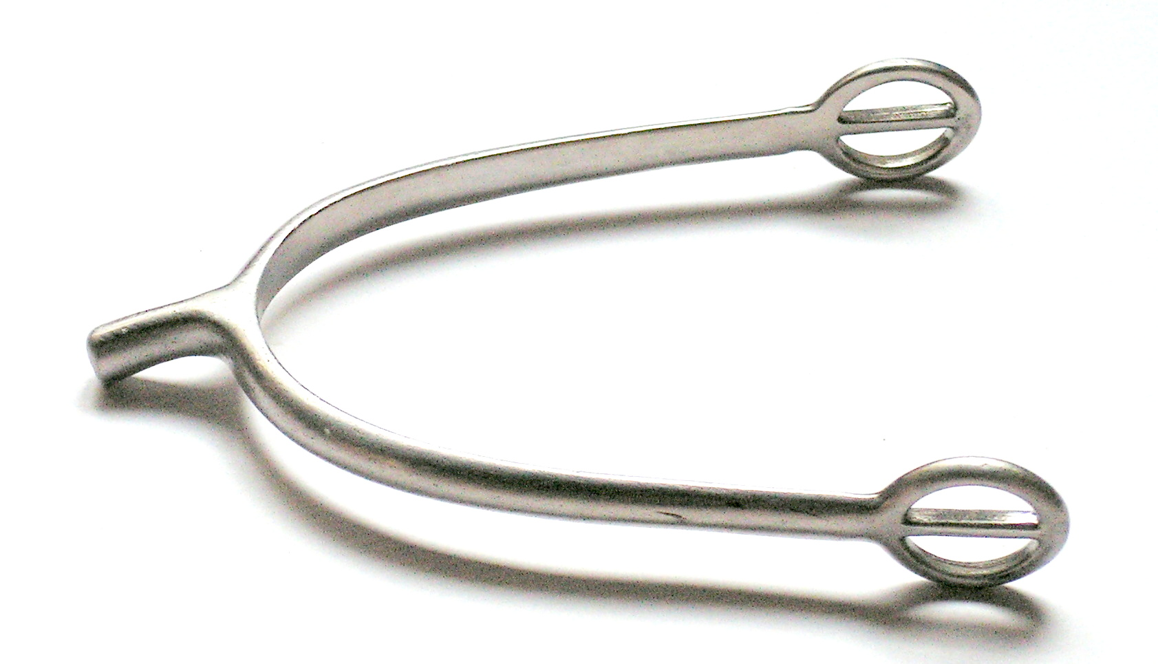 Eperon prince de Galle, tige courte